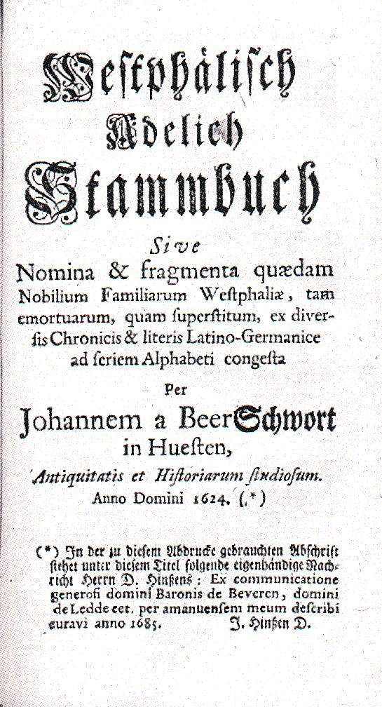 Titelblatt des "Westphälisch Adelich Stammbuch" begonnen 1624, gedruckt 1742